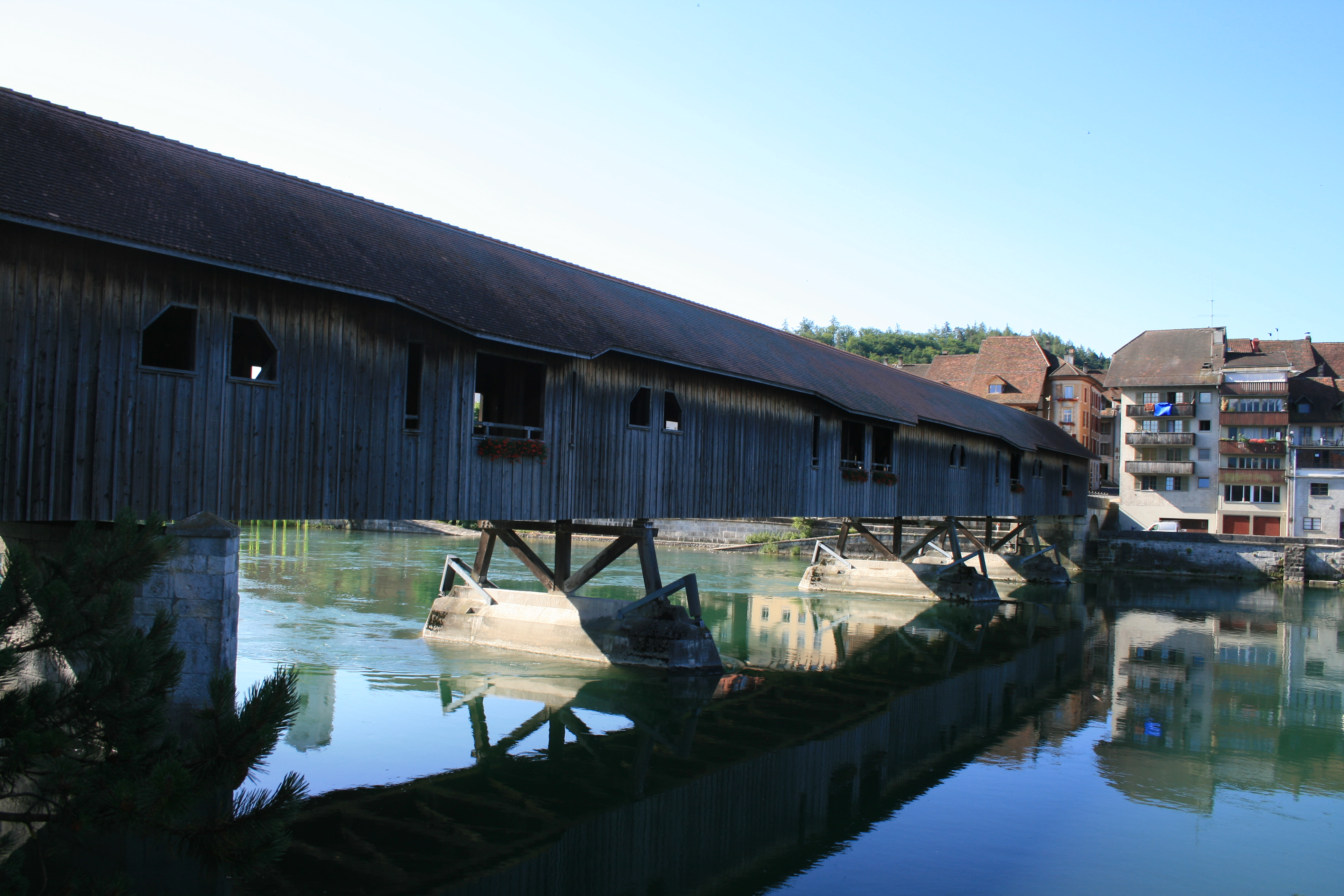 Holzbrücke in Büren